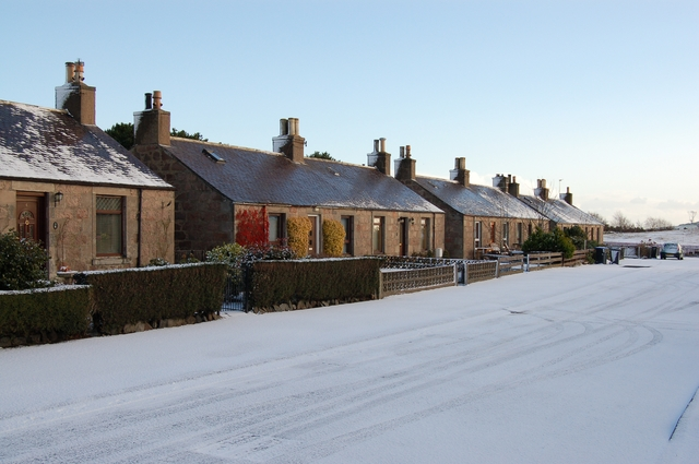 Park Terrace, Belhelvie, Aberdeenshire